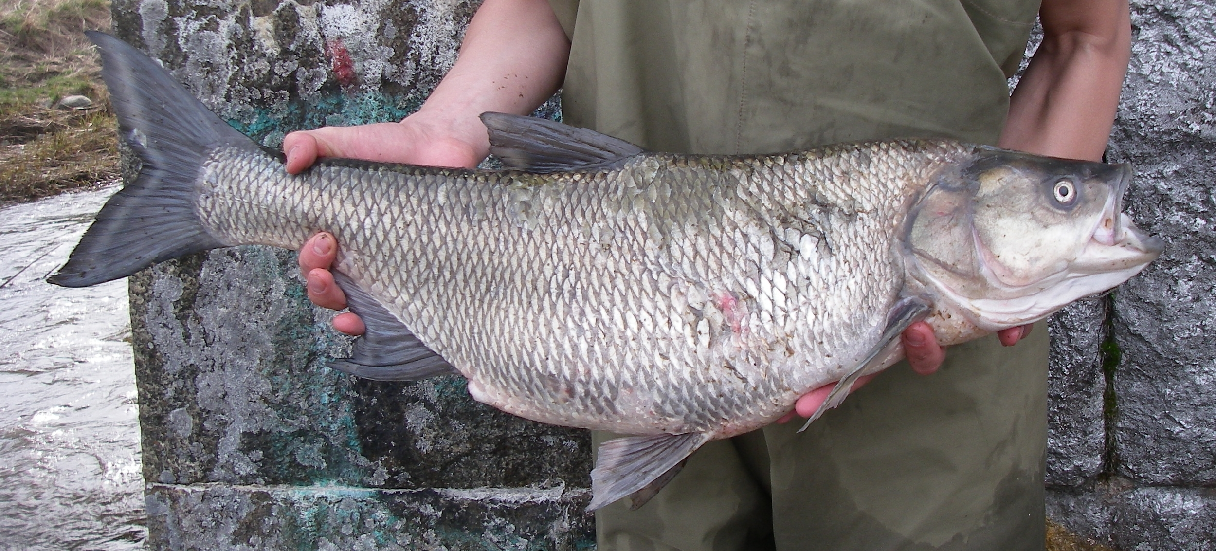 Asp (Aspius aspius). From Sävjaån (part of Fyris river, Uppsala län, Sweden. Found dead.